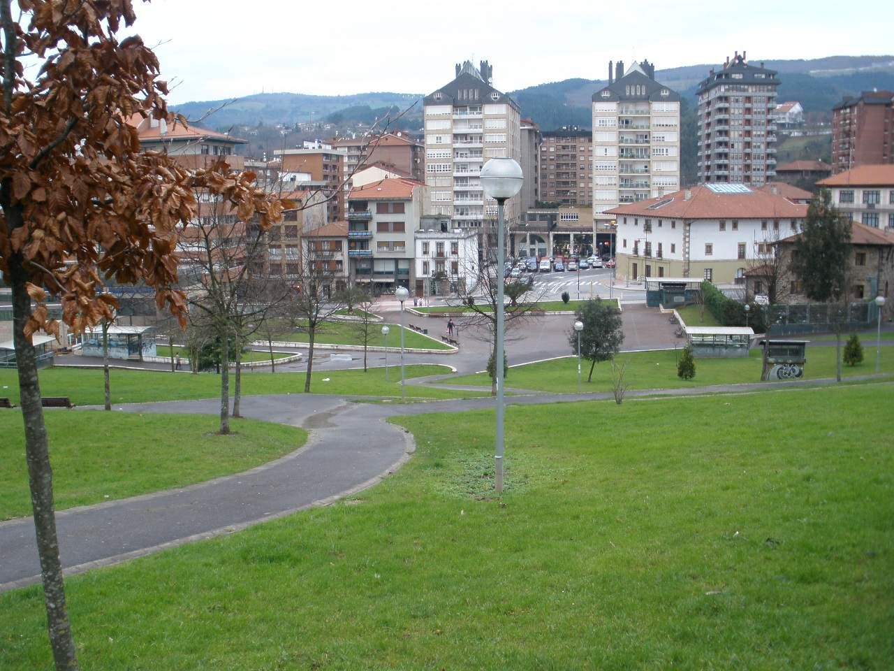 Galdakao (Bizkaia)